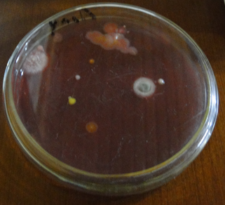 Cultivo de la bacteria Rhizobium Leguminosarum en agar YMA